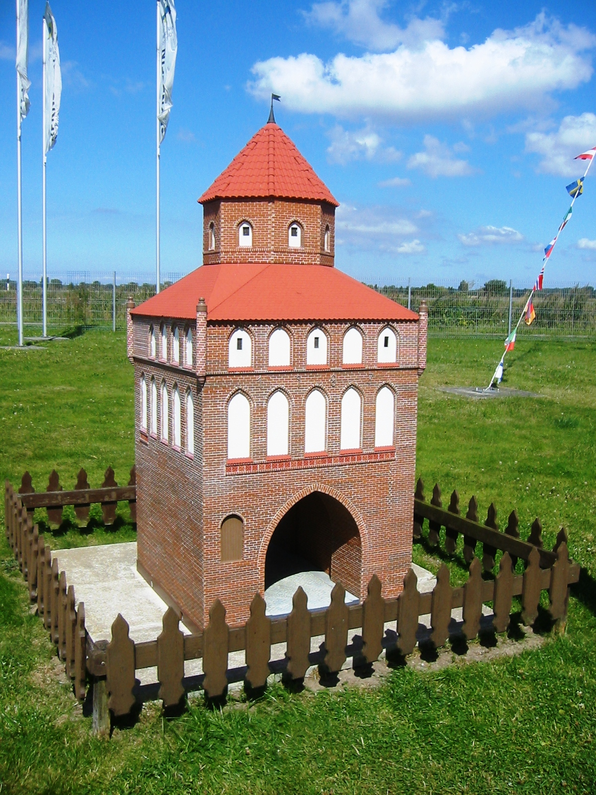 Modell des Rostocker Tors in Ribnitz-Damgarten vor der Schaumanufaktur im Ort. Das Modell wirbt für das Miniland MV in Göldenitz.